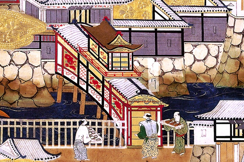 豊臣期大阪図屏風（オーストリア・エッゲンベルク城所蔵）部分。大阪城極楽橋。